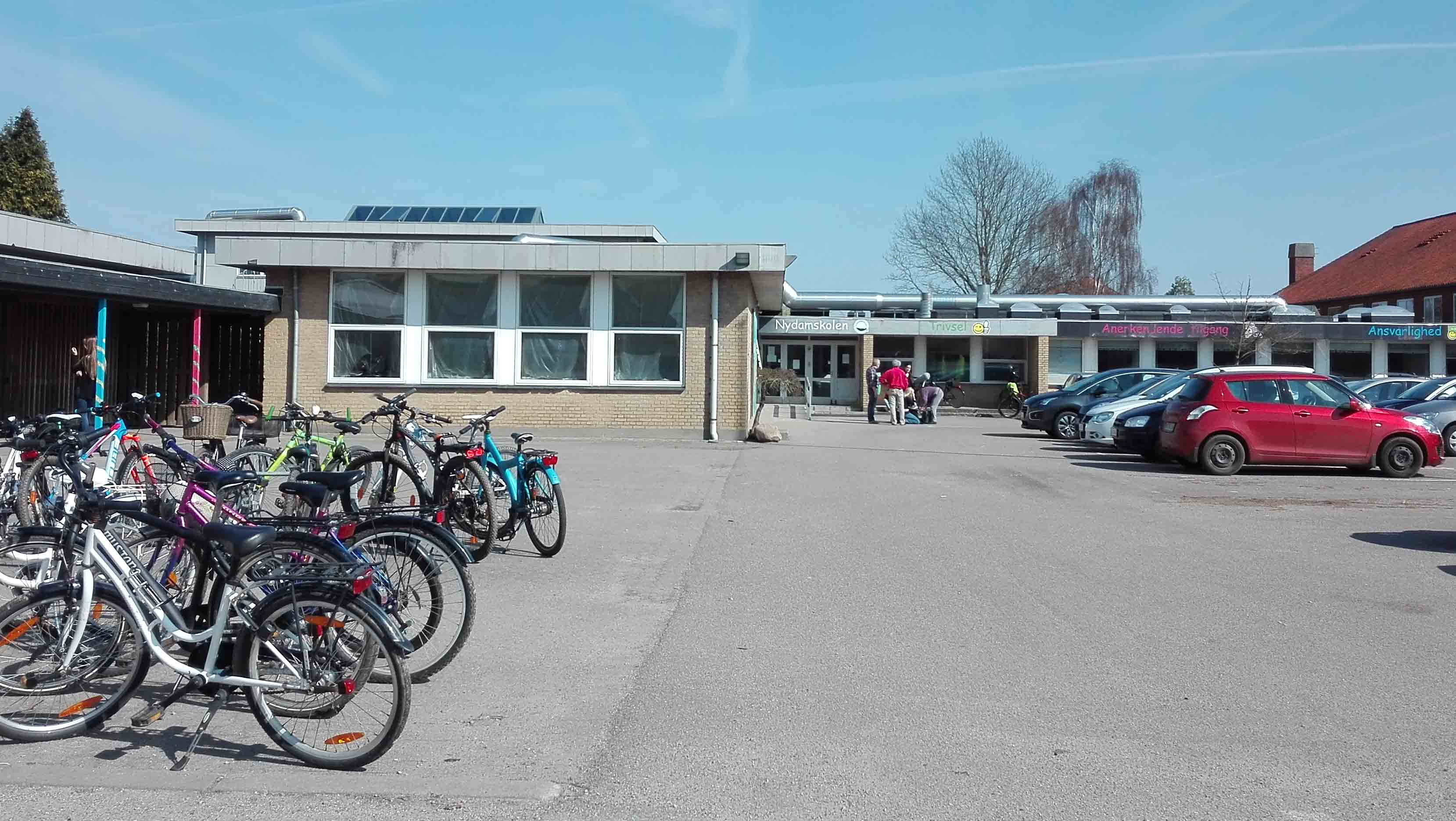 Nydamskolen i Vester Sottrup